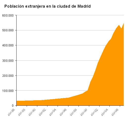 Evolución de la población extranjera en Madrid dede 1986. Fuente